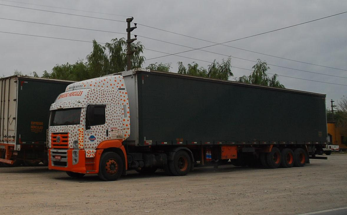 VW Constallation LKW mit Auflieger, aufgenommen in Argentinen